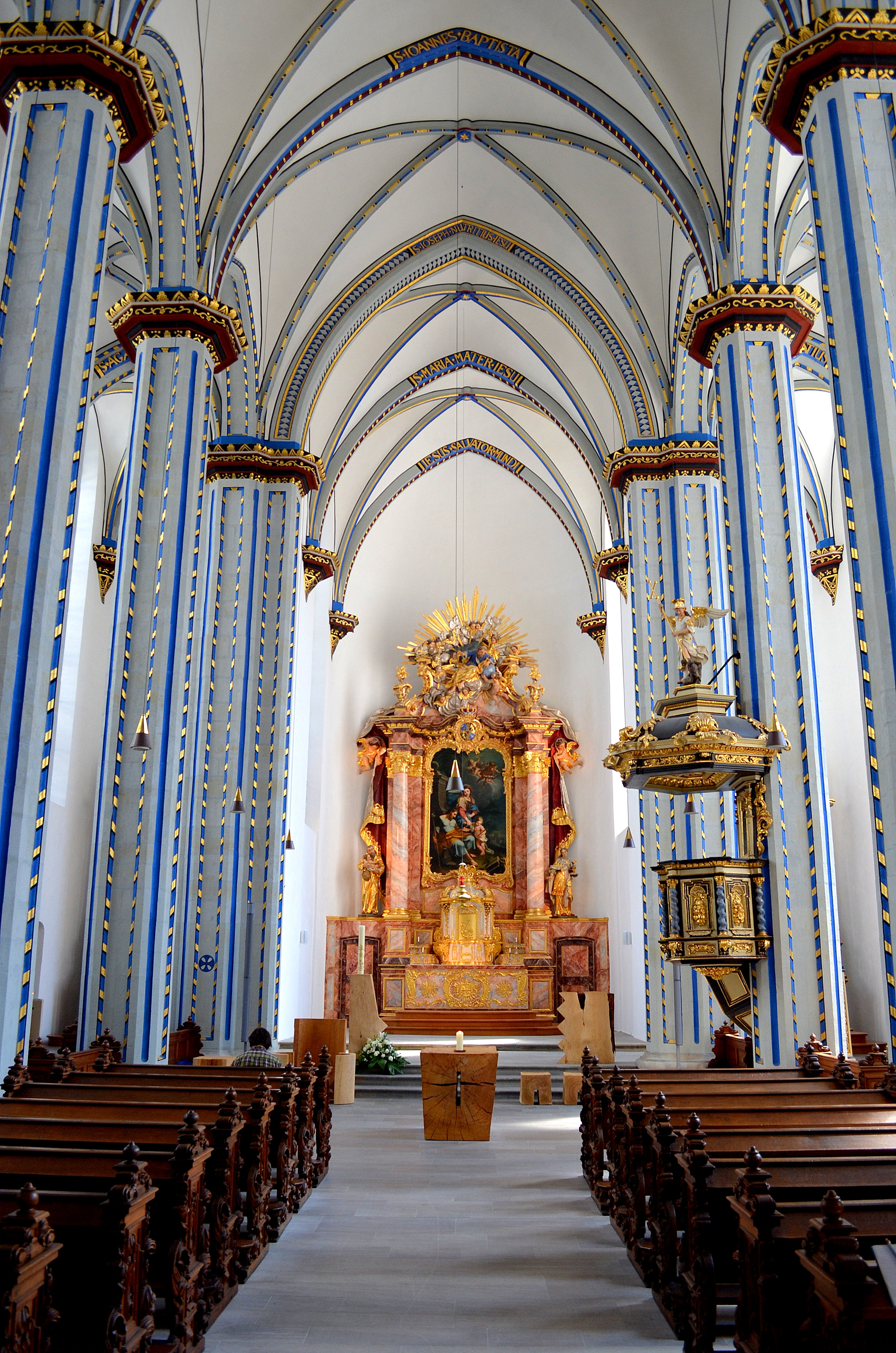 Naam van Jezuskerk (Namen-Jesu-Kirche), overzicht hoofdschip